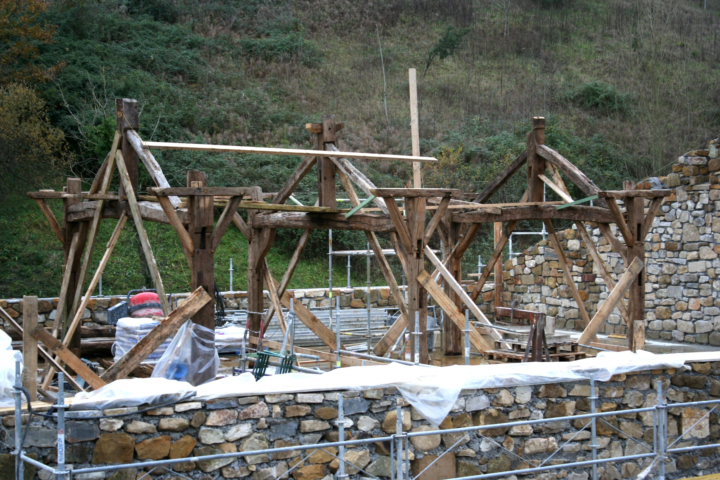 Tolare baserriaren zurezko egitura ikusgai, zaharberritze lanak direla-eta (Igara, Donostia)